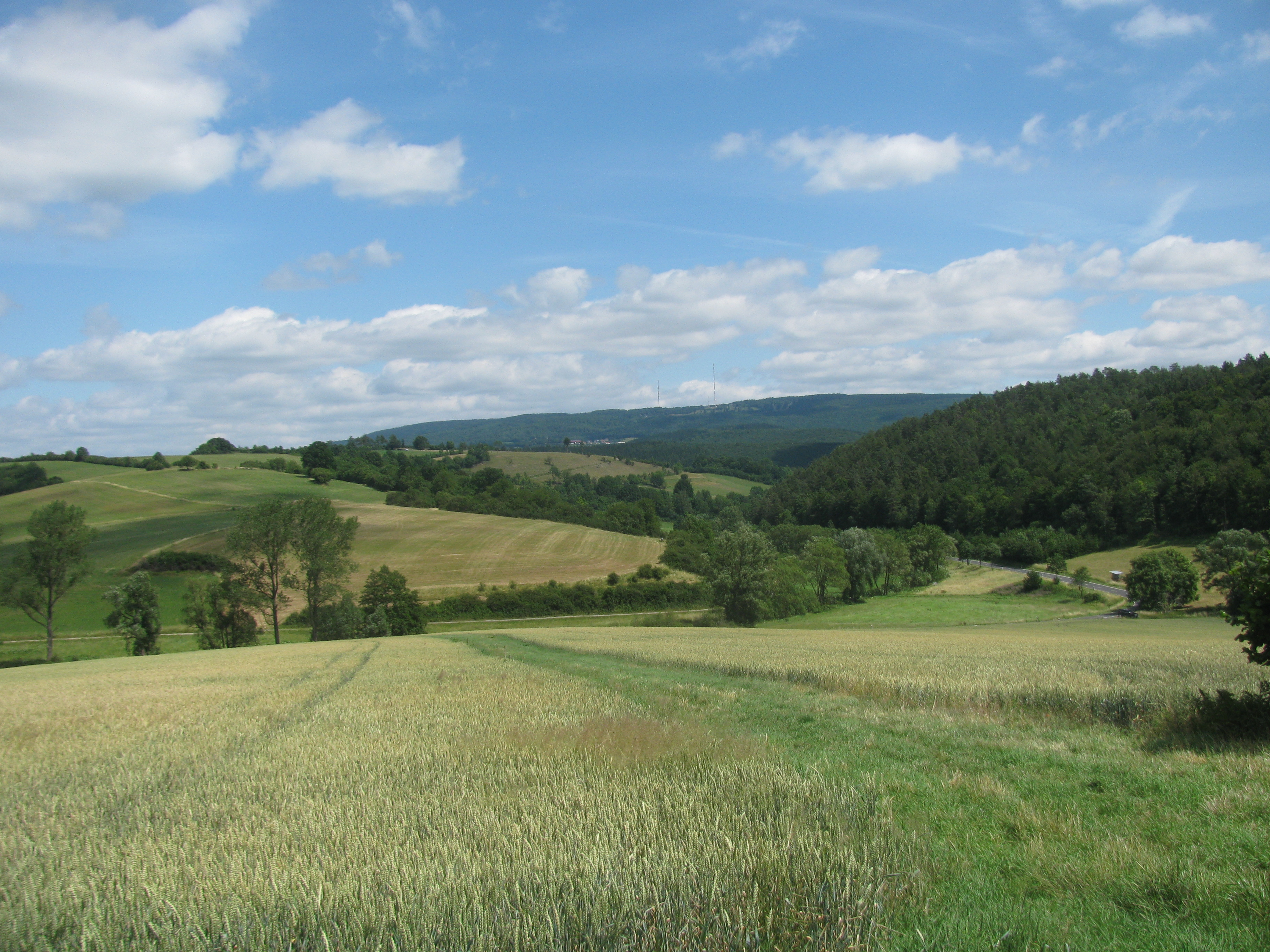 der Höhenrücken in der Bildmitte links gehört zu dem FFH-Gebiet Glimmerode und Hambach bei Hessisch Lichtenau, FFH 4824-308